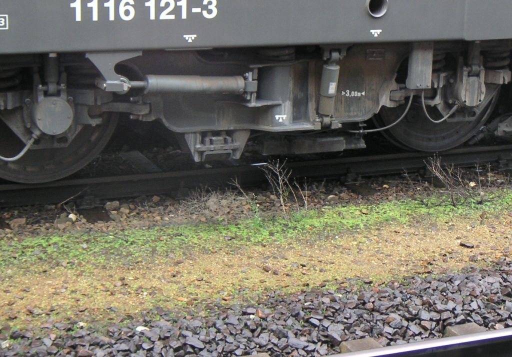 Indusi-Sendespule bei einer ÖBB 1116